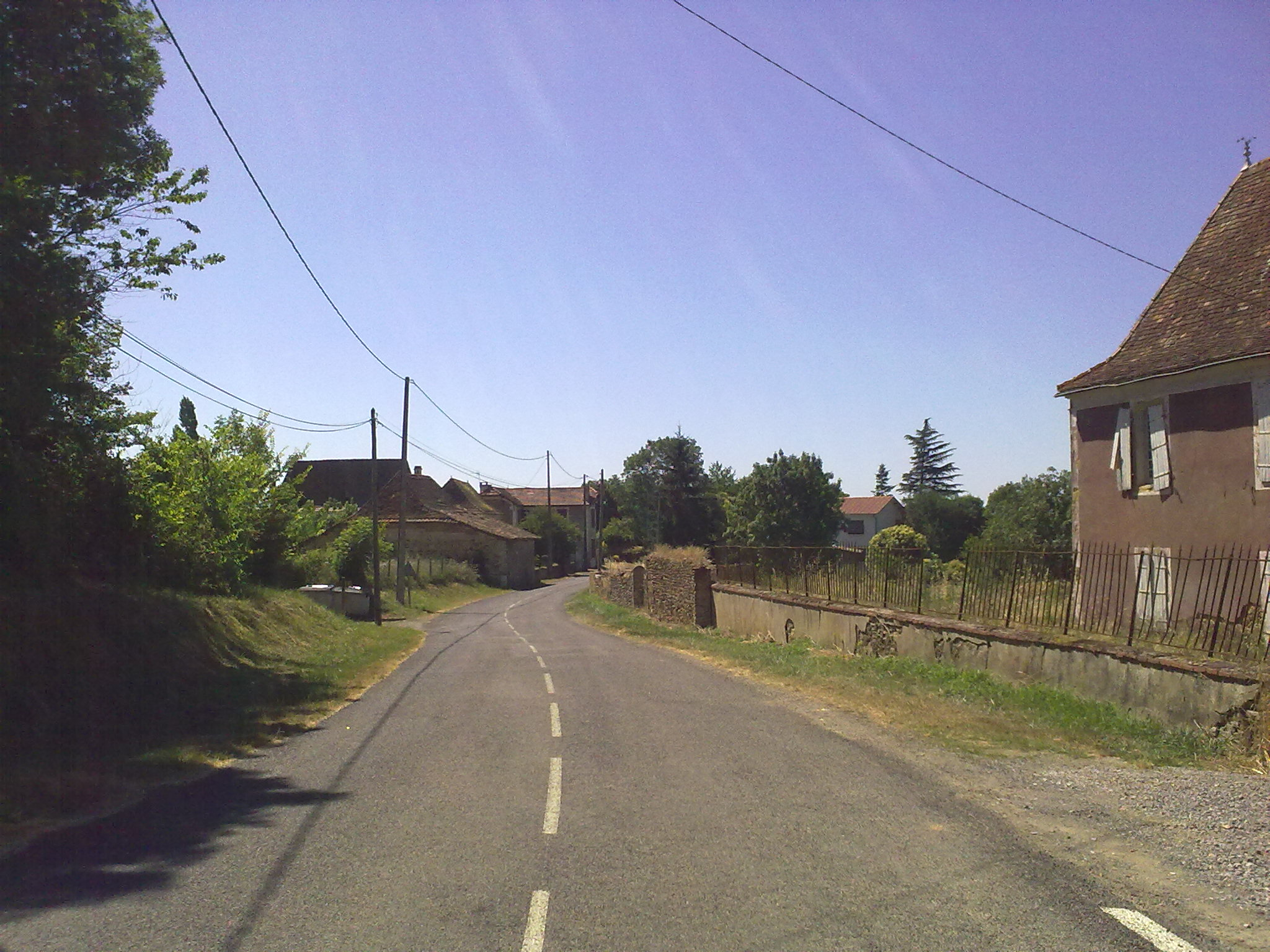 Saint-Médard (Pyrénées-Atlantiques) le 18 juillet 2010, France.